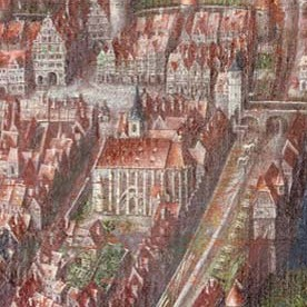 Detail aus der Stadtansicht von Georg Martin von 1628 mit St. Johannes